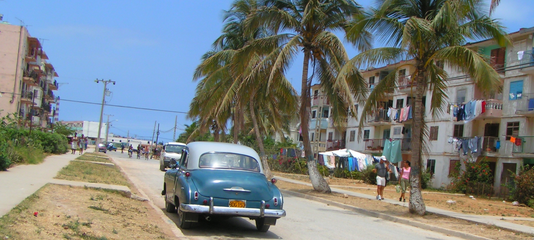 Street in Santa Cruz del Norte, Cuba